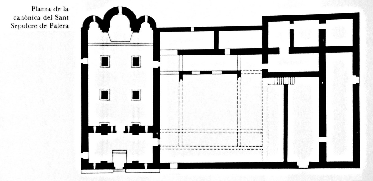 Església de Sant Sepulcre de Palera (Beuda, la Garrotxa, Catalonia, Spain) Romànic / Románico / Romanesque s.XI.